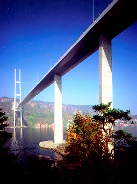 Grenland_bro